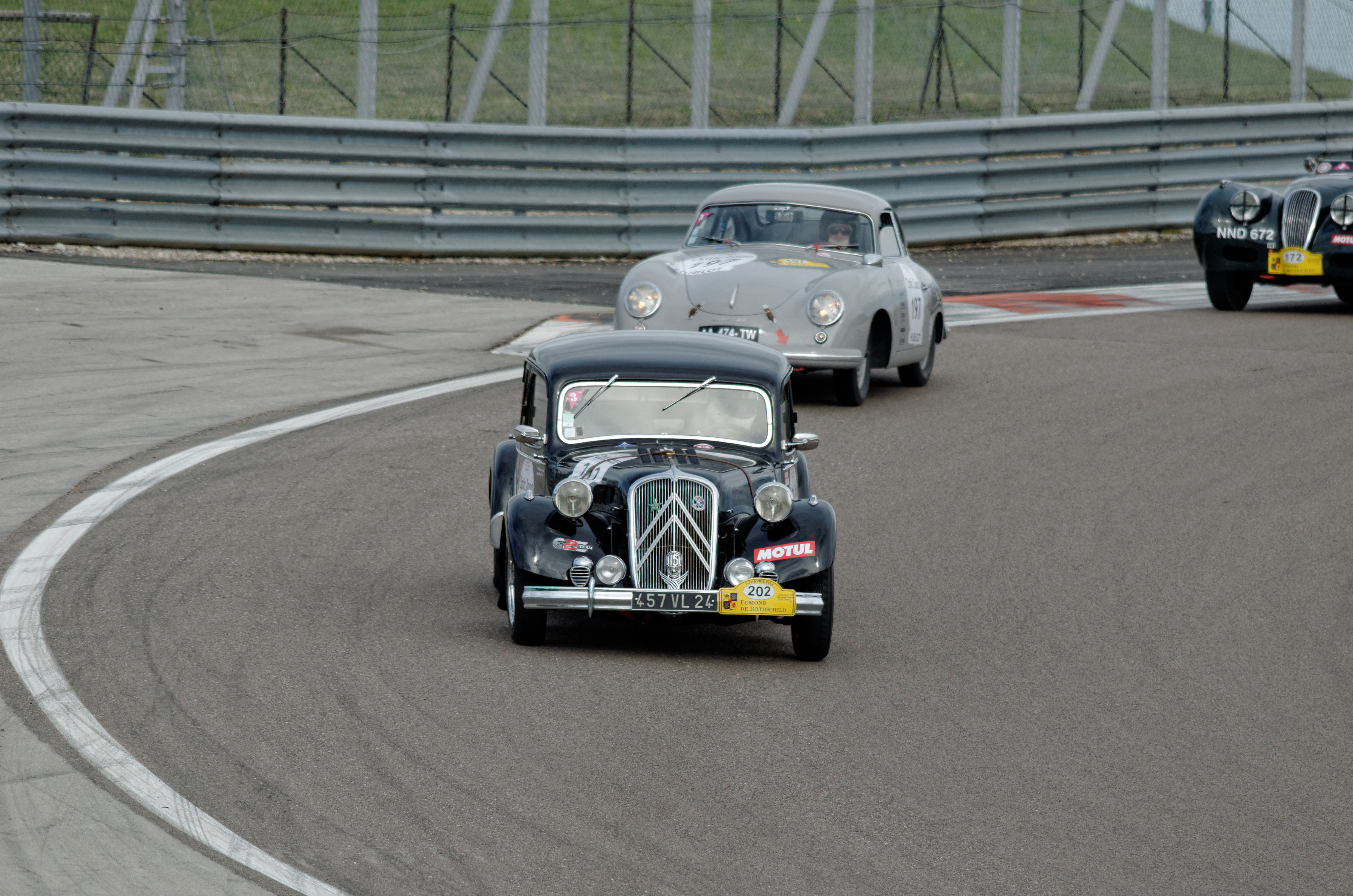 Citroen 15 six, Tour Auto 2014, étape sur le Circuit de Prenois.